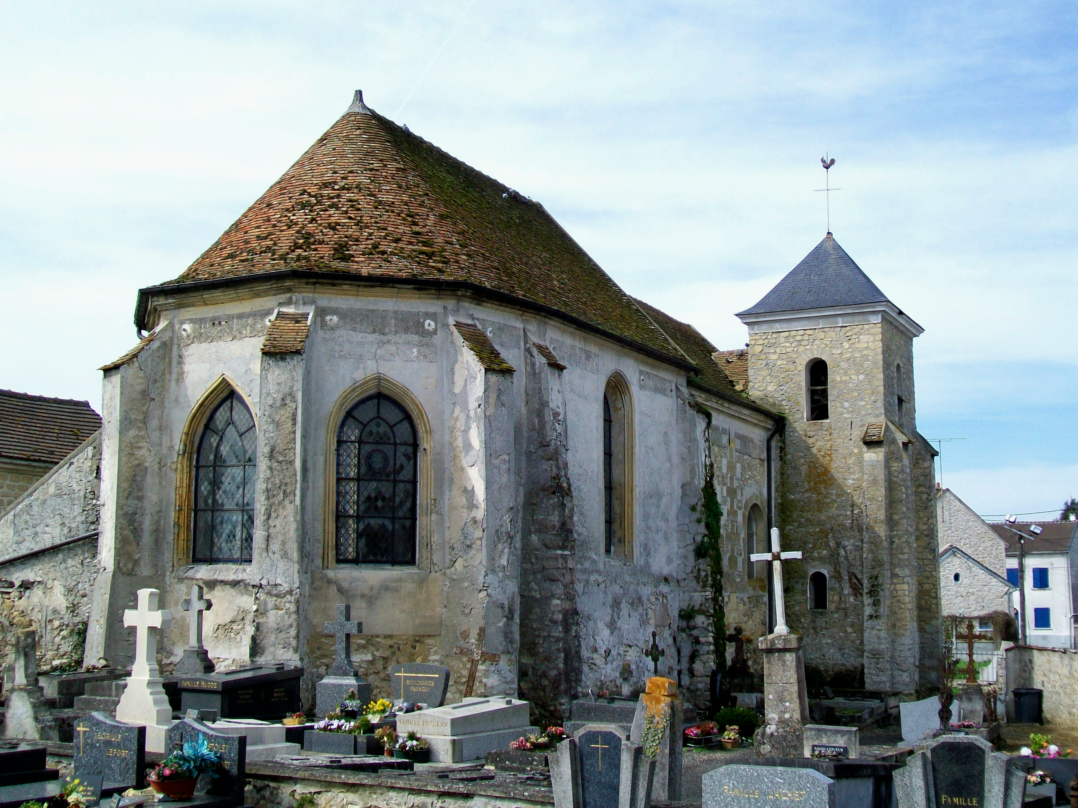 Le chœur de l'église de Lassy (95).